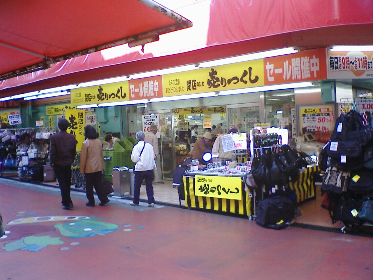 2005年10月末に閉店したダイエー垂水店（閉店セール中）